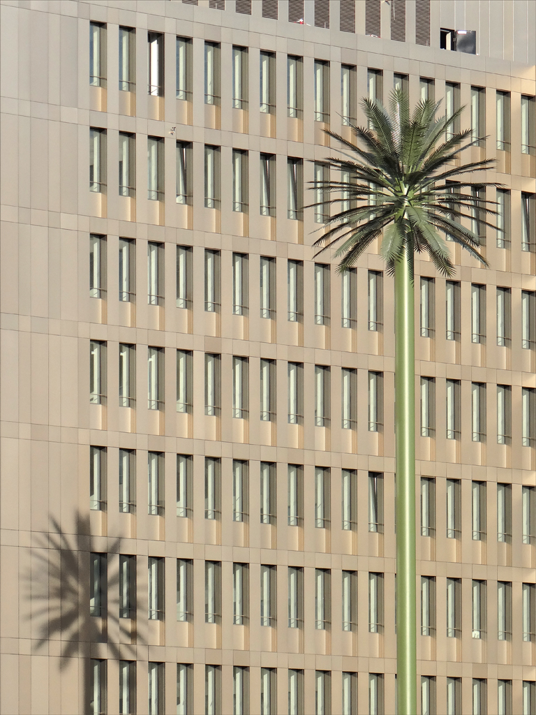 Eléments de la façade du siège du BND encore en construction BND : Neubau der zentrale des Bundesnachrichtendienst / Federal Intelligence Service / Service fédéral du renseignement 2006 - 2014 Architectes : Jan Kleihues, Kleihues + Kleihues Gesellschaft von architekten mbH Le siège du Service fédéral du renseignement (BND) est dans le quartier Mitte de Berlin. Il est en cours de construction sur un site de 10 hectares, il est conçu pour héberger 4000 salariés. Le bâtiment est construit selon les plans de l'architecte Berlinois Jan Kleihues + bureaux de Kleihues.